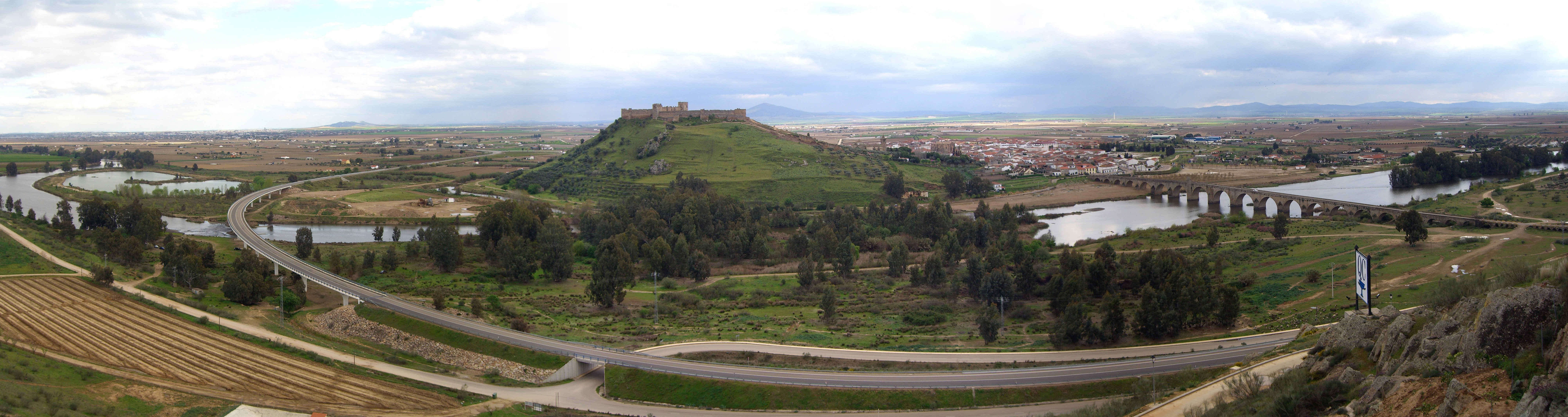 Panorámica de Medellín, municipio de la provincia de Badajoz. Pertenece a la comarca agraria de Las Vegas Altas del Guadiana, en la parte centro-sur de la comunidad autónoma de Extremadura, España.